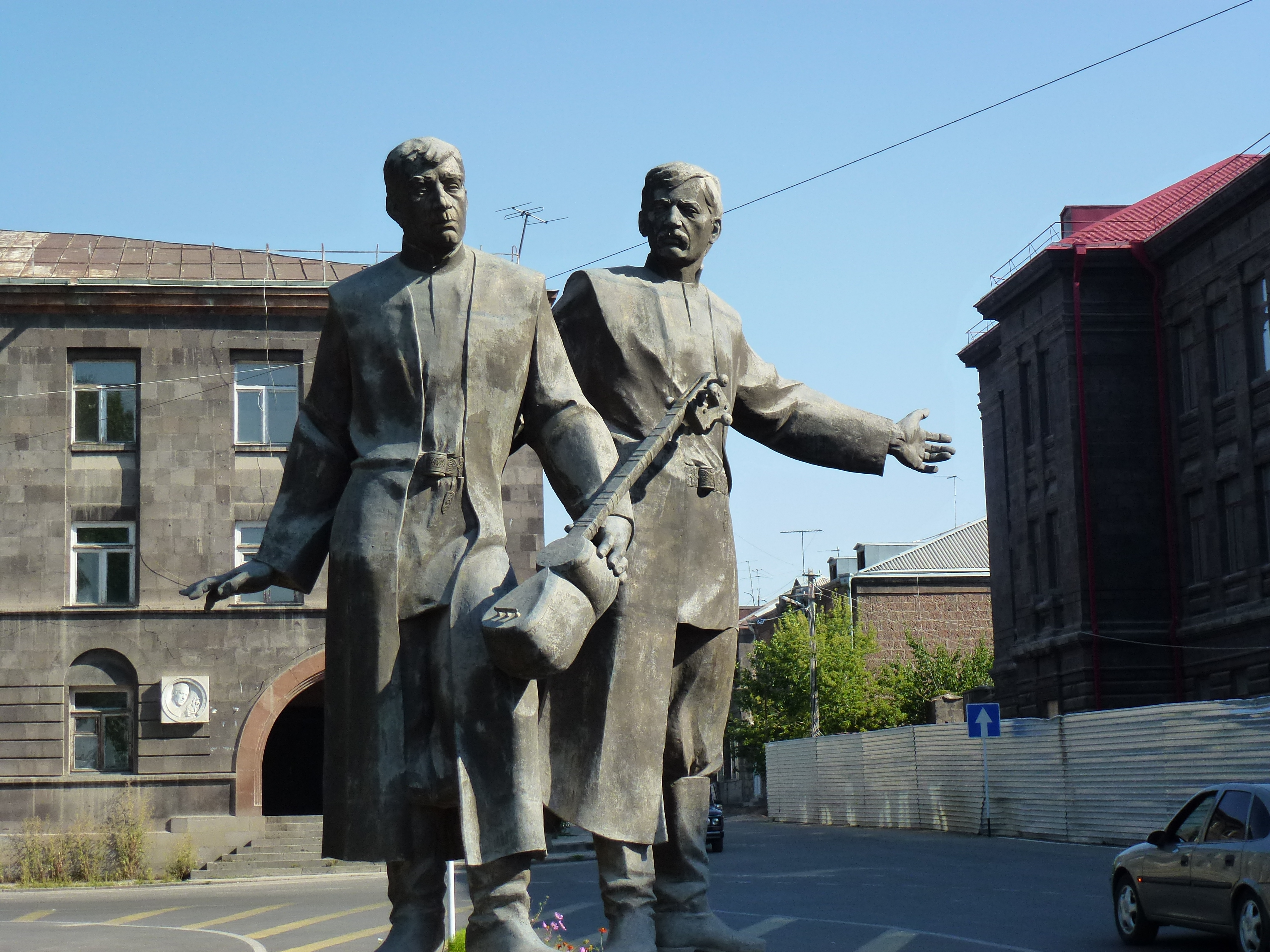 Գուսանների հուշարձանը Գյումրիում 1/4